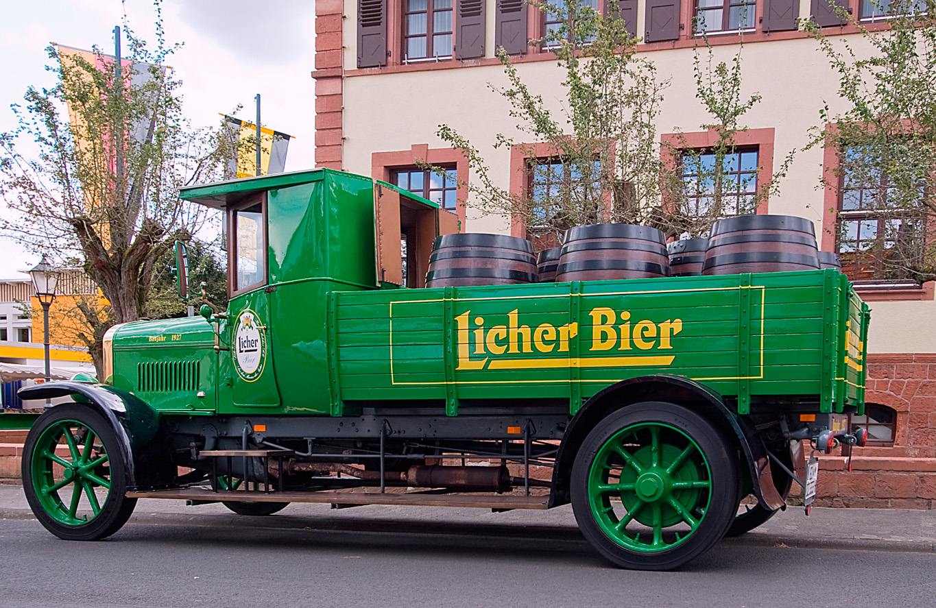 Licher-Oldtimer. Erstzulassung 1. Juli 1927 Hersteller: Klöckner-Humboldt-Deutz und Magirus Vierzylinder-Benzinmotor mit 7638 cm² Hubraum und 65 PS Leisung bei 1100 Umdrehungen/Minute Vollgummibereifung - Bezeichnung: 150*770 6mkg Trommelbremsen hinten, vorne keine Bremsen Ursprüngliche Höchstgeschwindigkeit: ca. 50 km/h, durch Sperrung des 3. und 4. Ganges jetzt auf 20 km/h beschränkt Leergewicht 4640 kg ein baugleiches Fahrzeug befand sich im Fuhrpark der Brauerei Jhring-Melchior - der aktuelle Oldtimer wurde jedoch später bereits als Oldtimer gekauft.